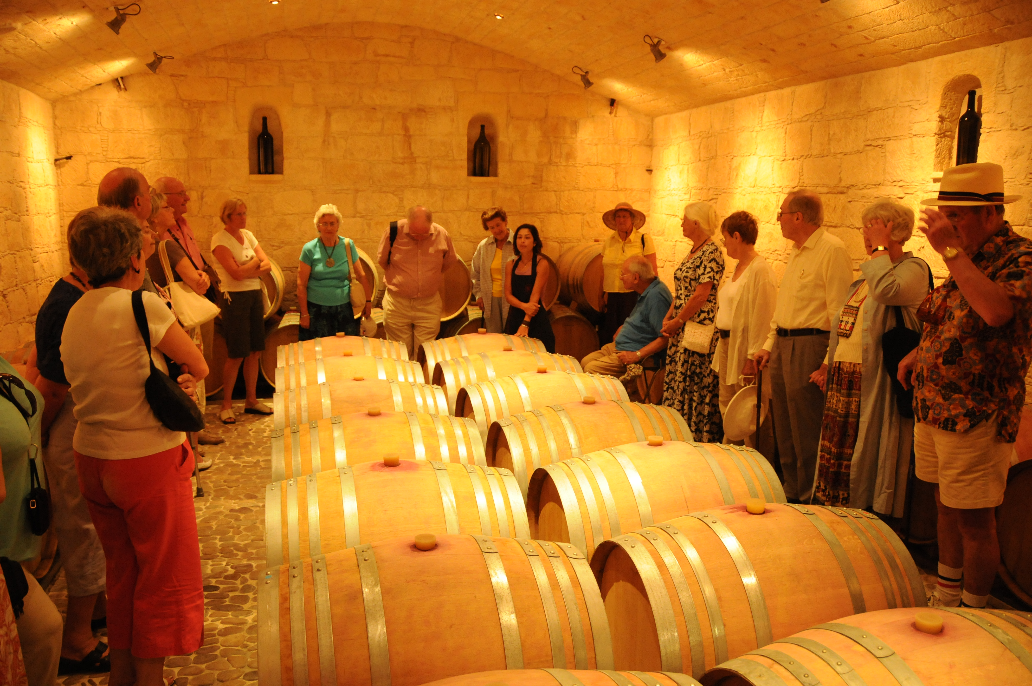 Vieillissement en fûts neufs à la cave Vasa à Potamiou